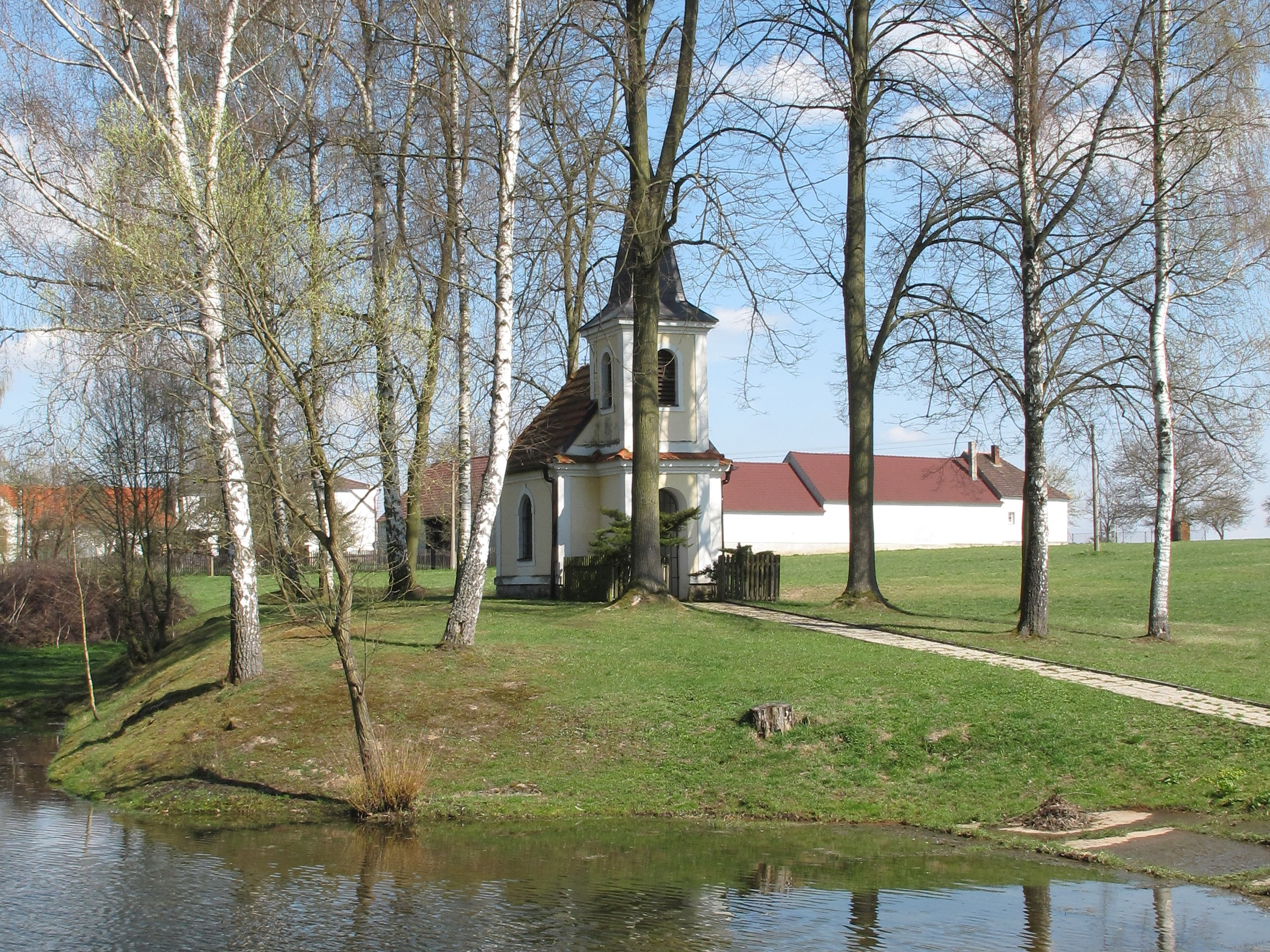 Rybník v Dolních Kněžekladech. Okres České Budějovice, Česká republika.